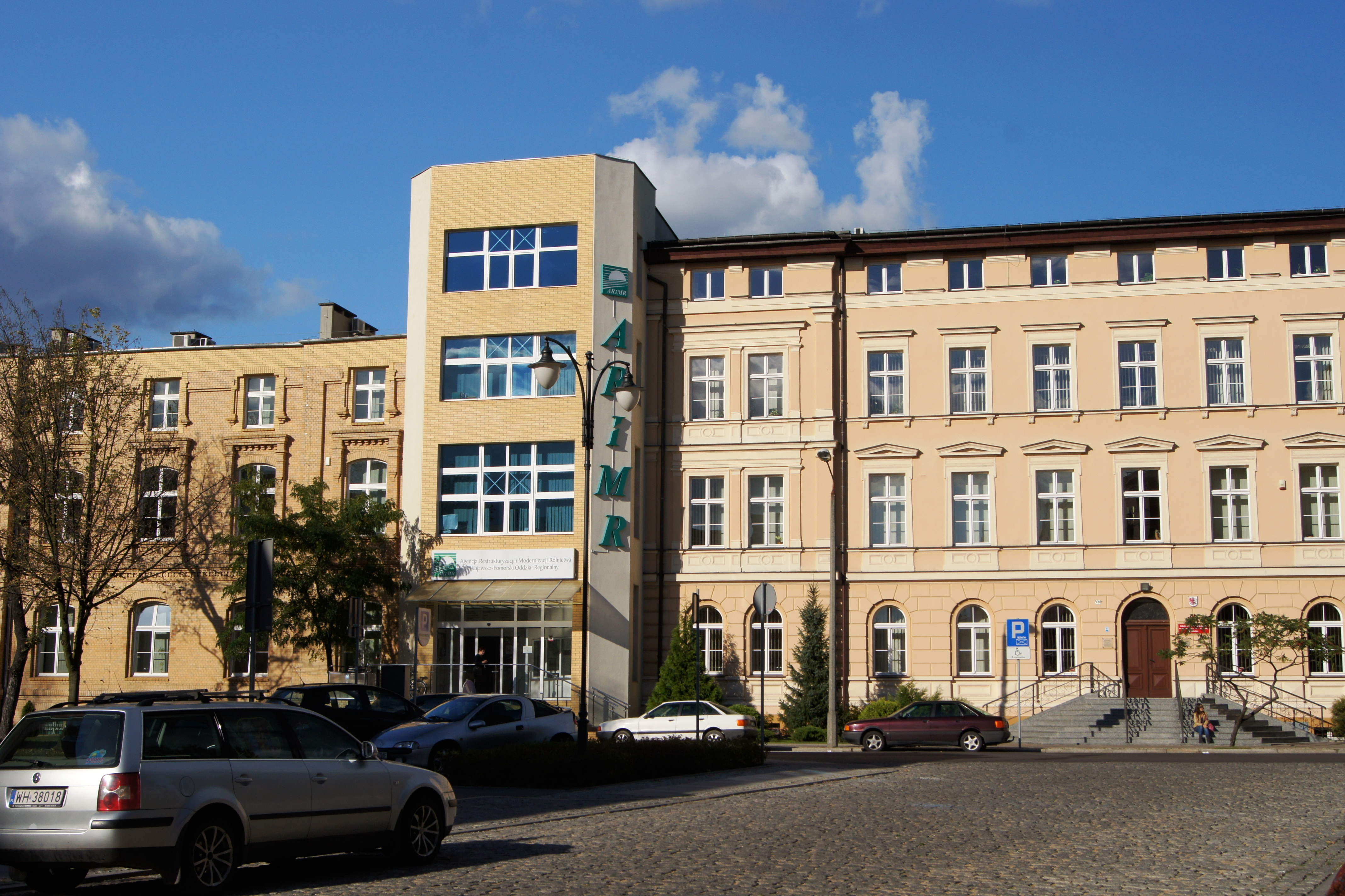 Toruń, ul. gen. J. Dąbrowskiego 4 - dawny szpital wojskowy, obecnie biblioteka, 1891-1896 (zabytek nr rejestr. A/178)